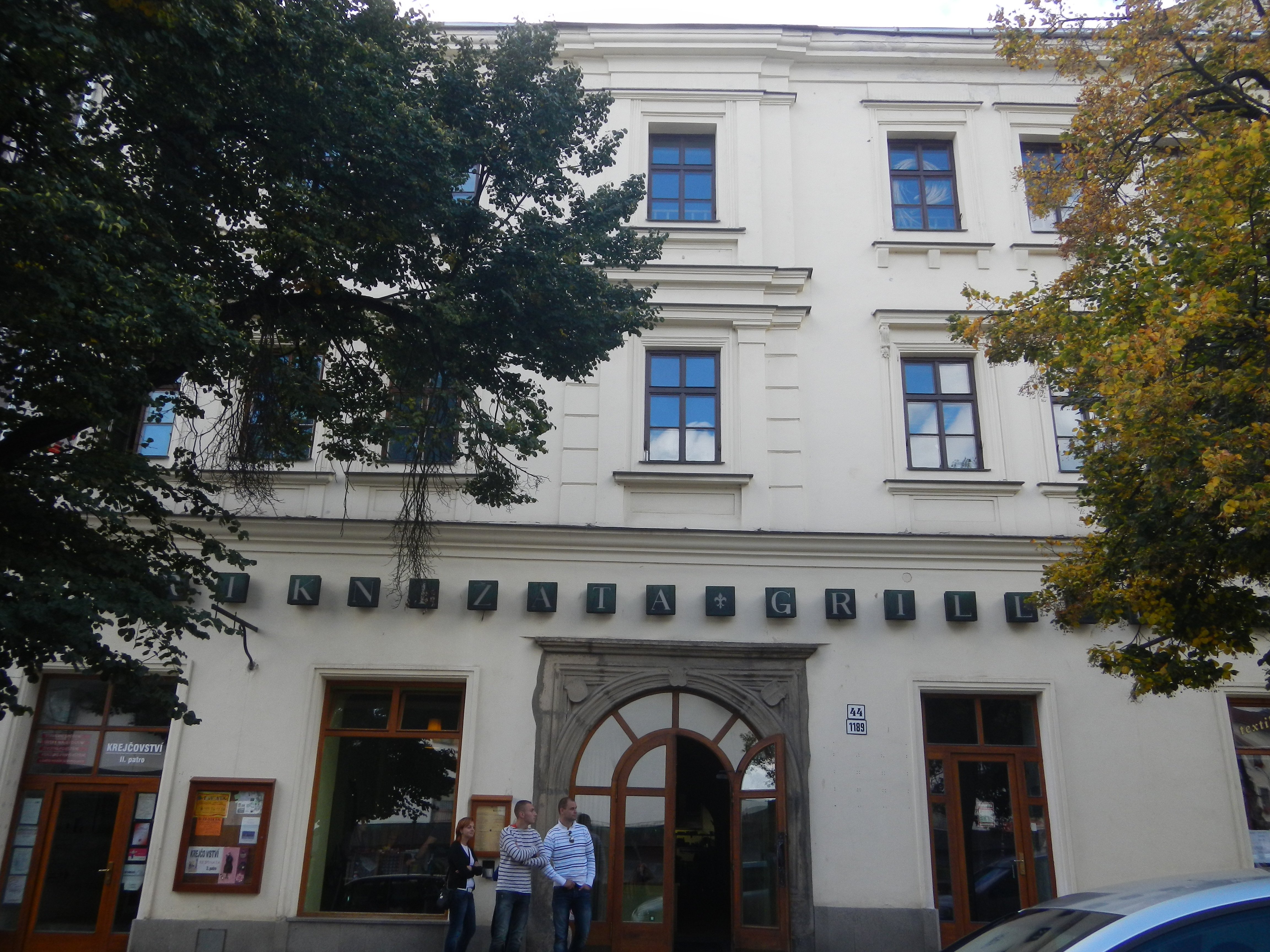 Měšťanský dům (Jihlava), Masarykovo nám. 1189/44, Jihlava